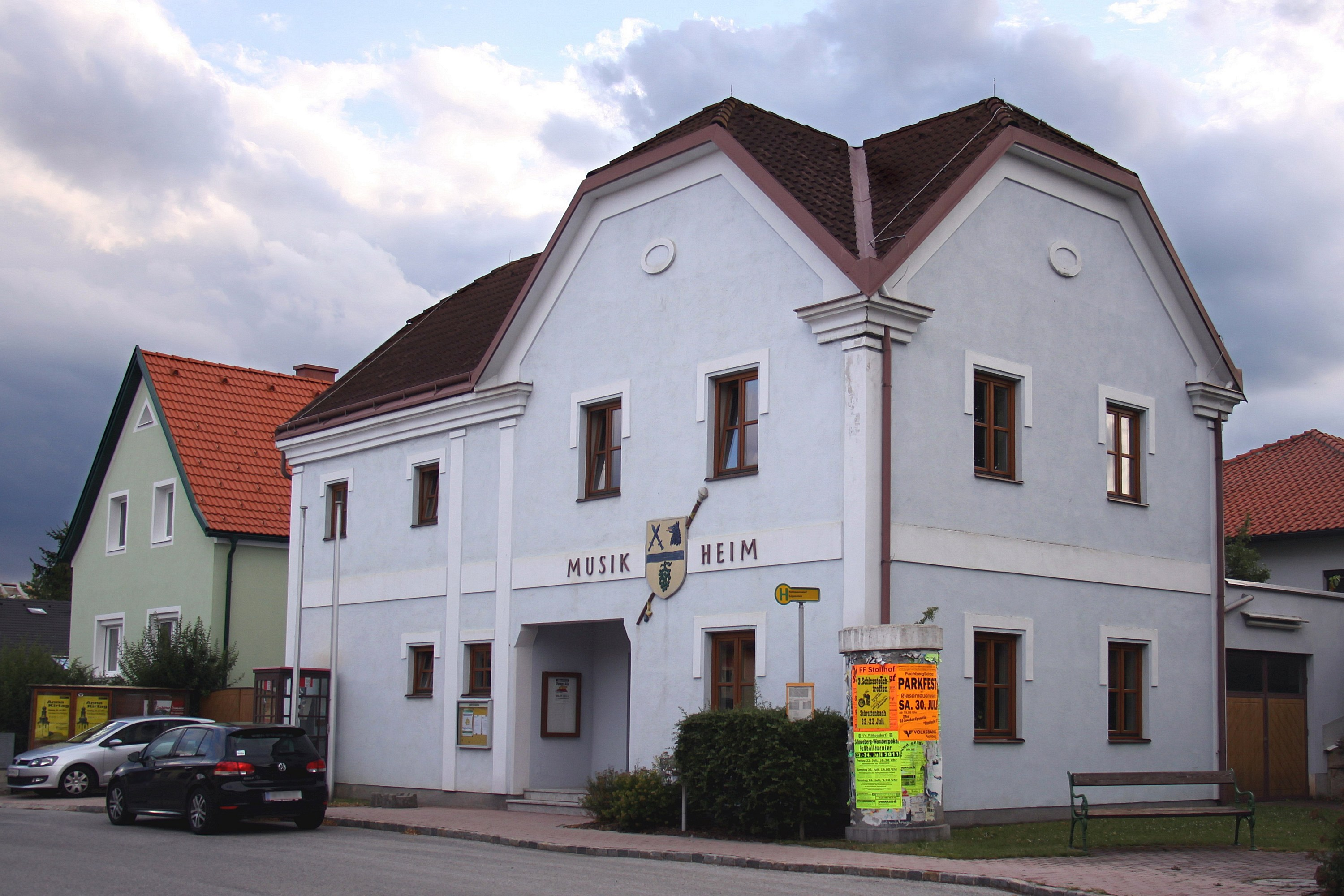 in der Katastralgemeinde Hettmannsdorf (Hettmannsdorferstraße) in Würflach. - OpenStreetMap(Info)